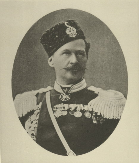 Дмитрий Антонович Скалон генерал-майором.